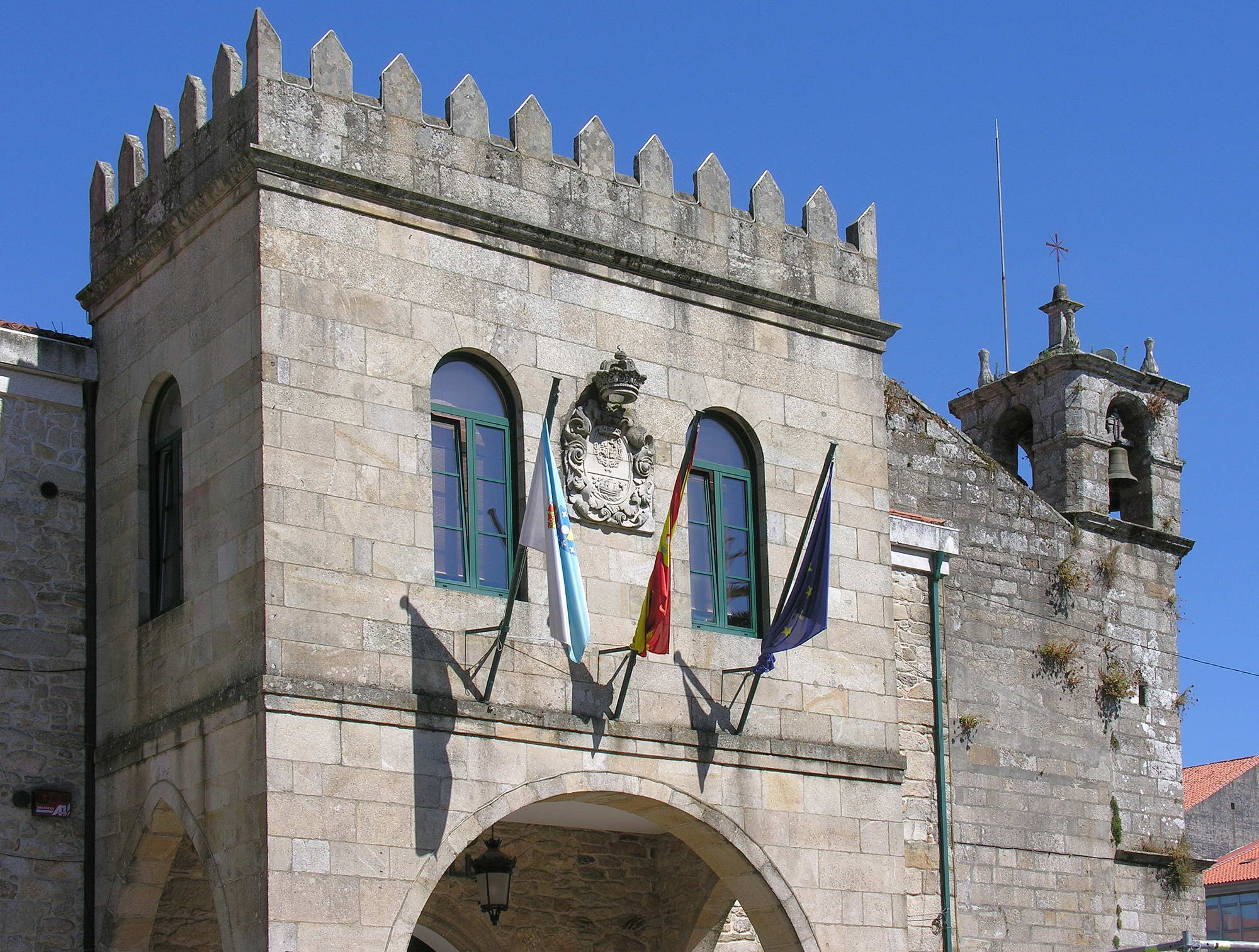 Concello, Noia, Galicia